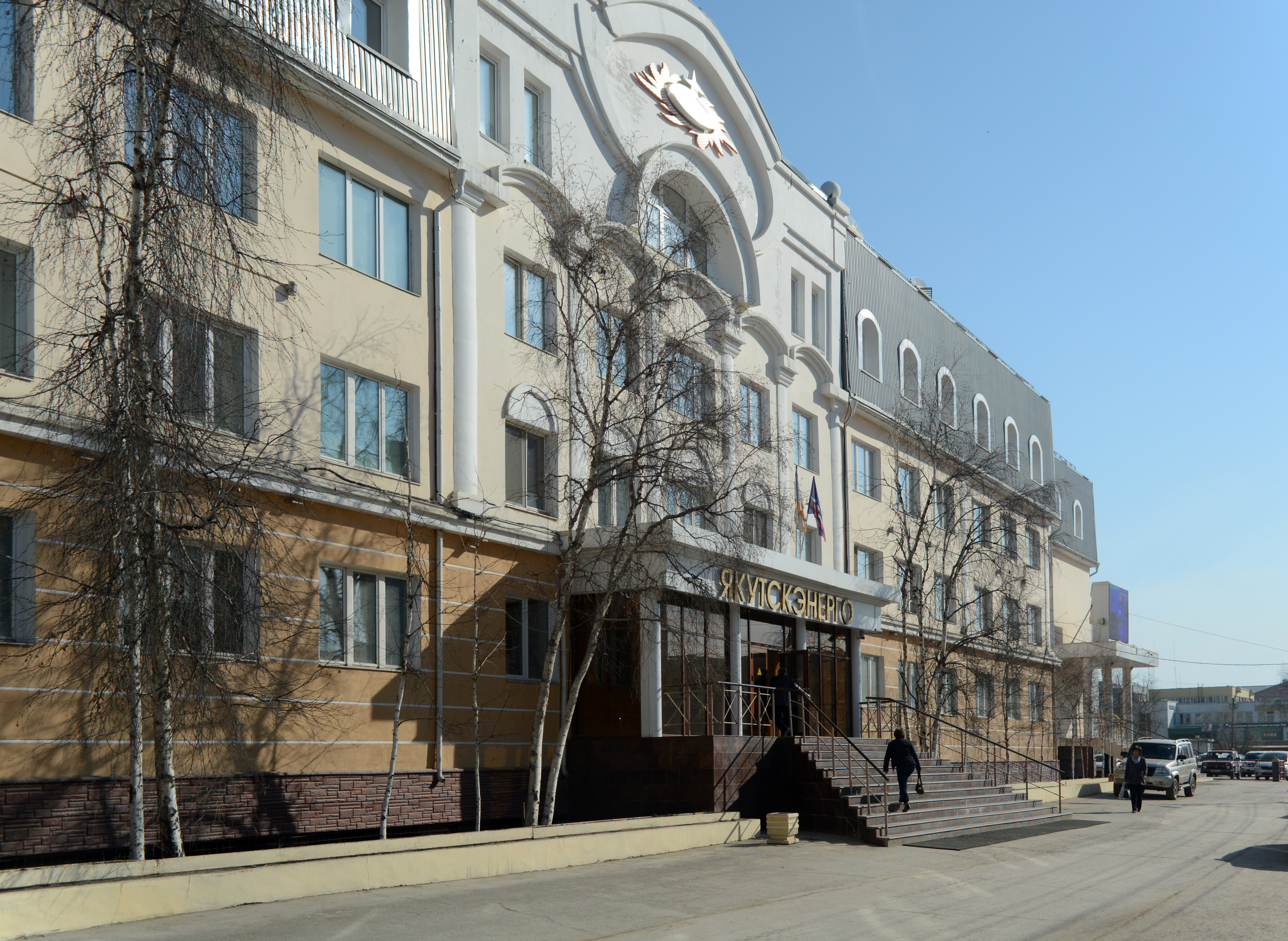 Штаб-квартира Якутскэнерго в Якутске. Россия.